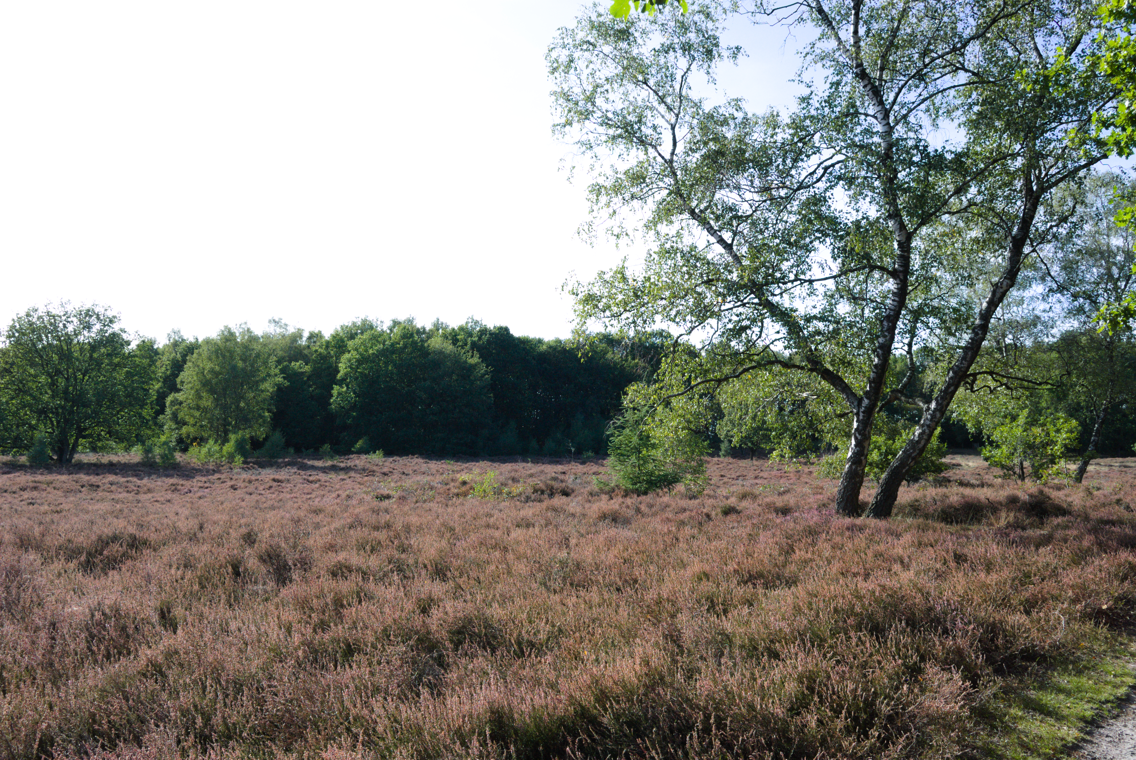 Heidefläche mit Birke in der Hügelgräberheide Halle-Hesingen